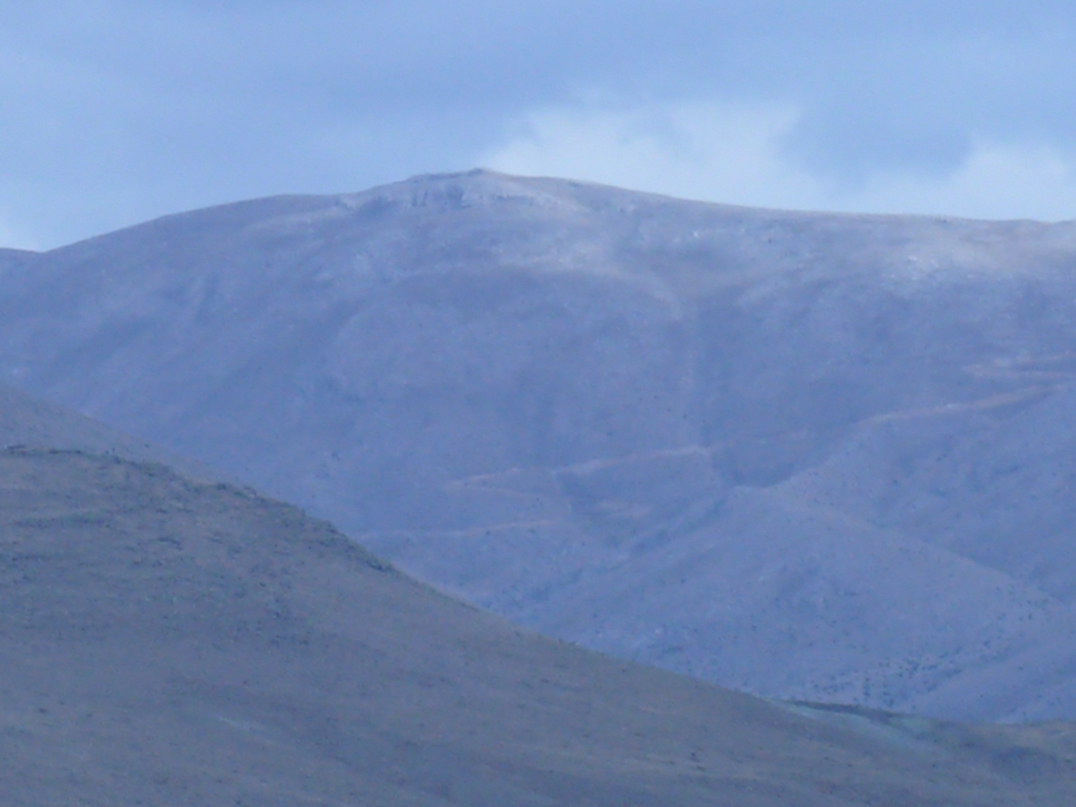 Kayseri'ye bağlı Tomarza ilçesine bağlı Dadaloğlu beldesinden bir görünüş.